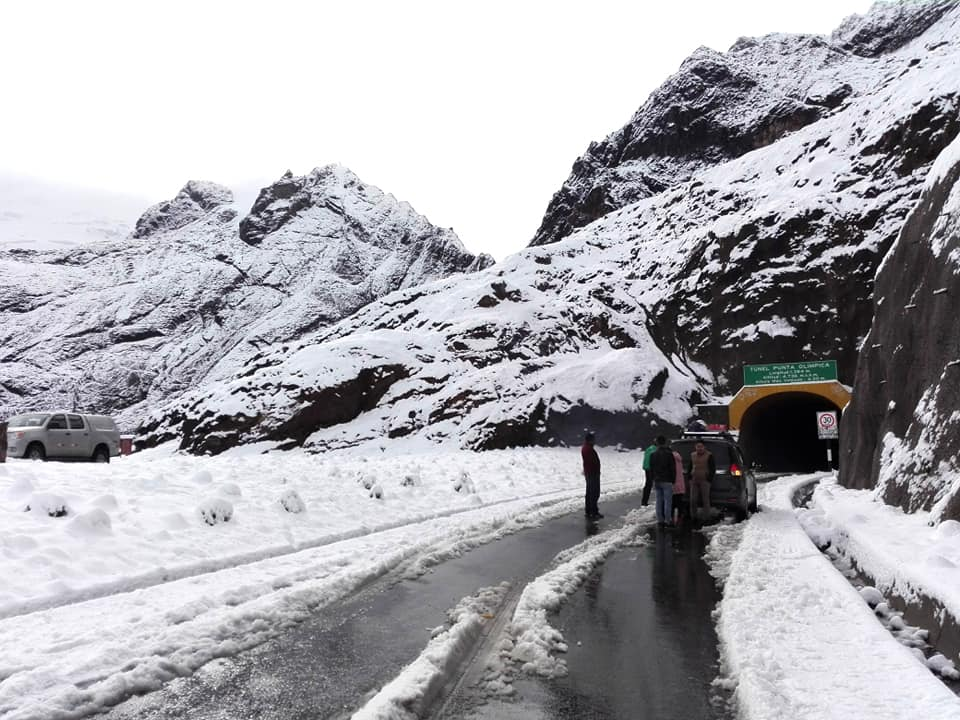 Túnel Punta Olímpica, en octubre de 2018.